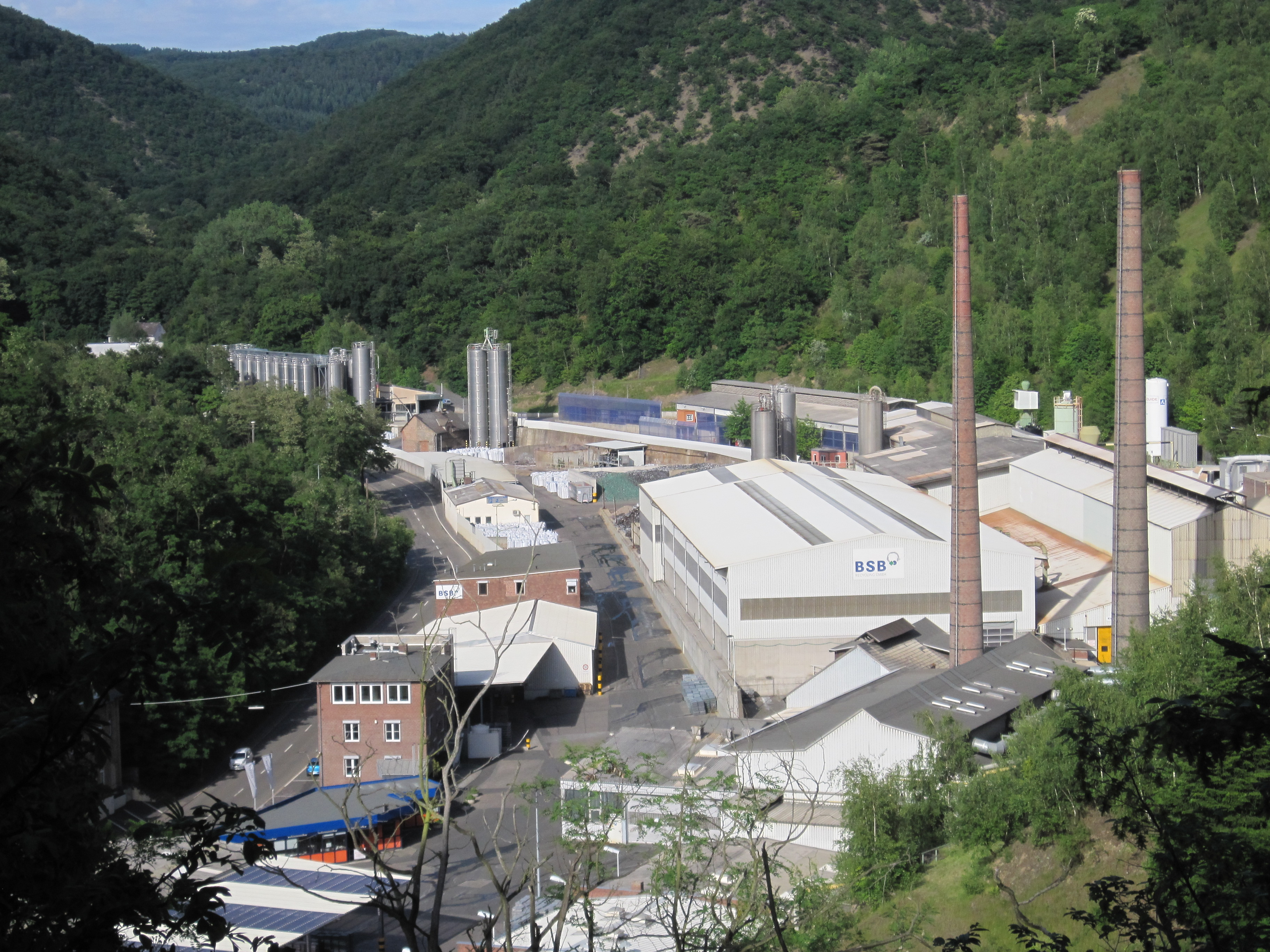 Ehemalige Blei- und Silberhütte Braubach, Rhein-Lahn-Kreis, Rheinland-Pfalz. Heute BSB Recycling.